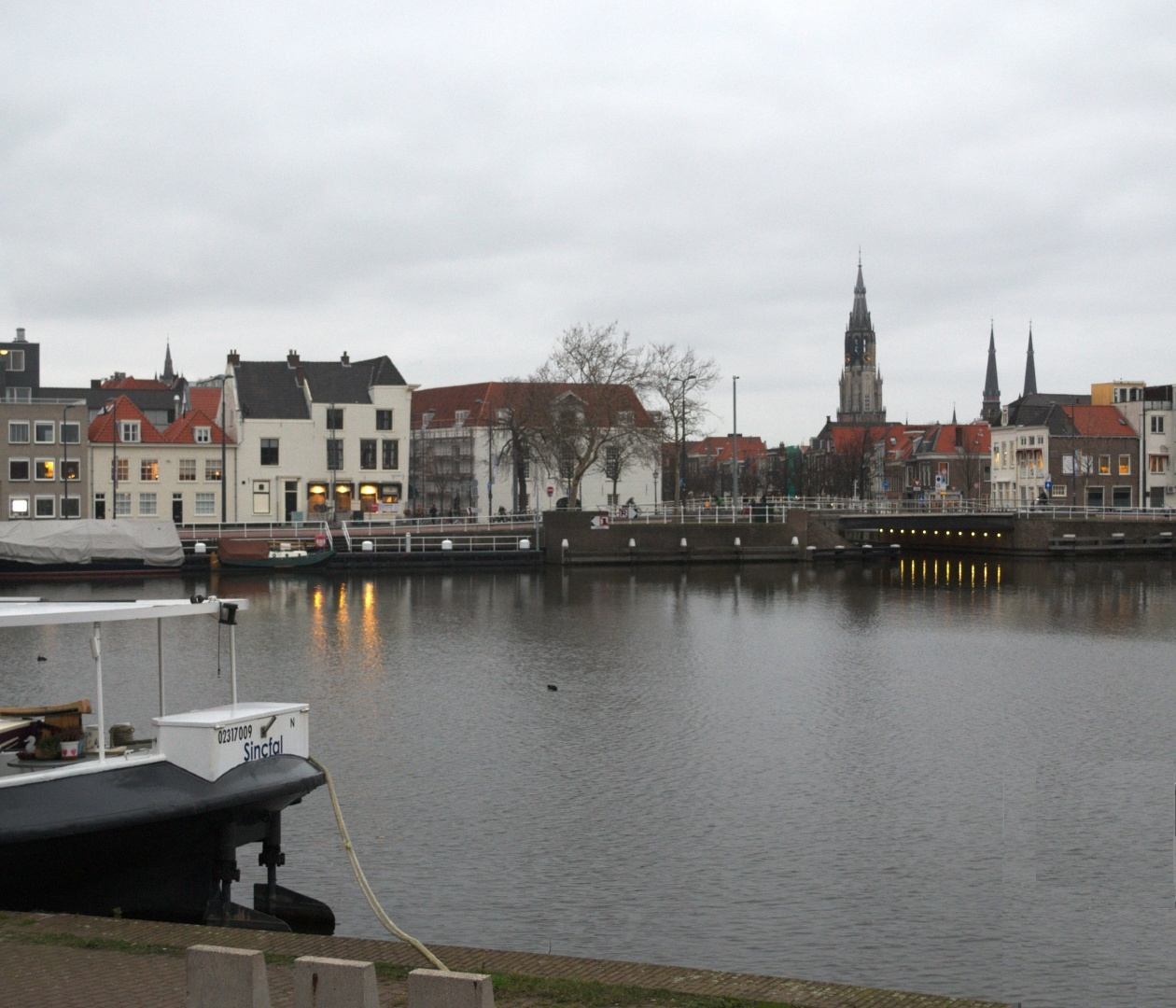 Современный вид гавани Делфта с места, с которого Вермеер рисовал картину Вид Делфта.